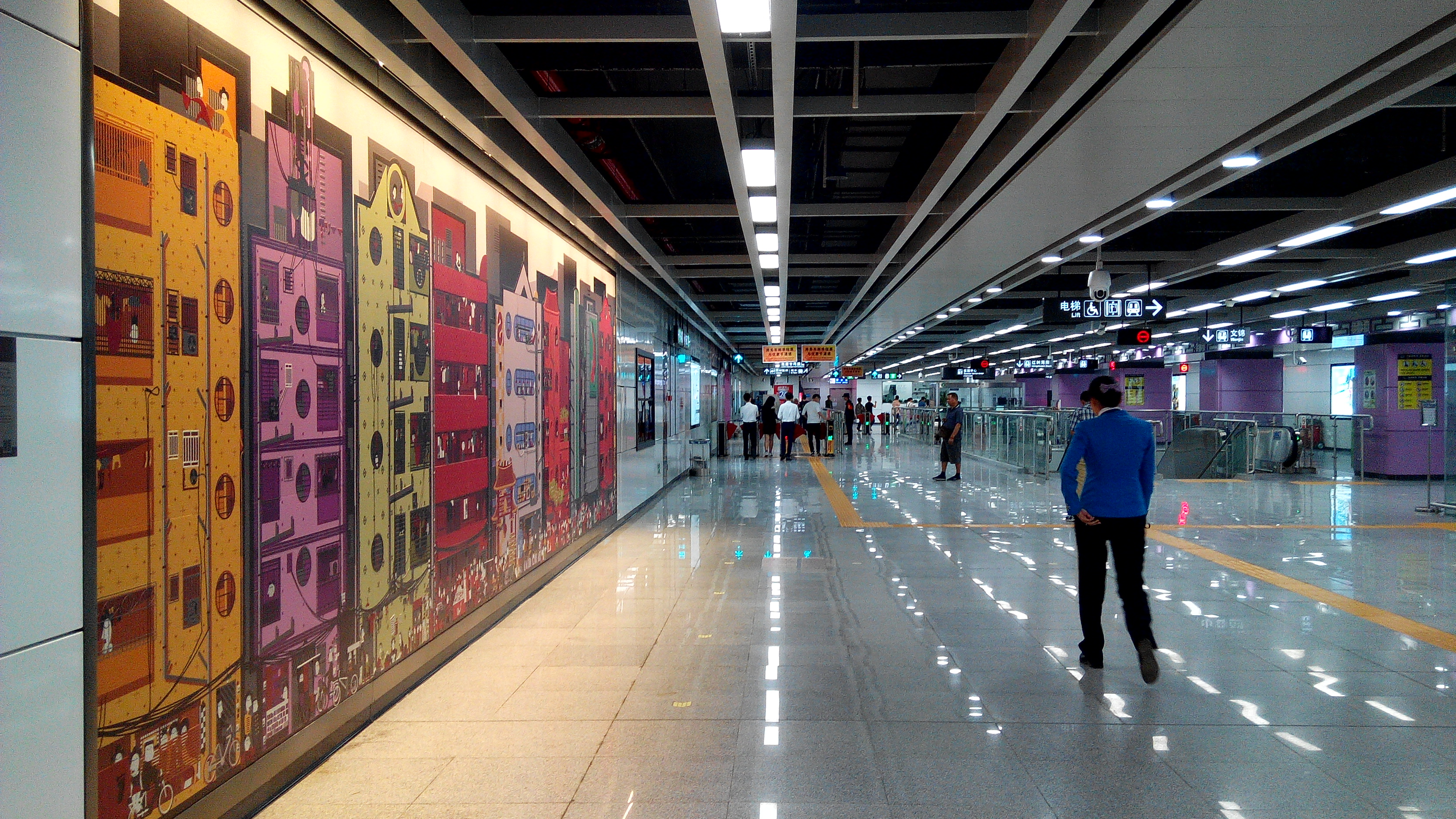 深圳地铁9号线 向西村站站厅